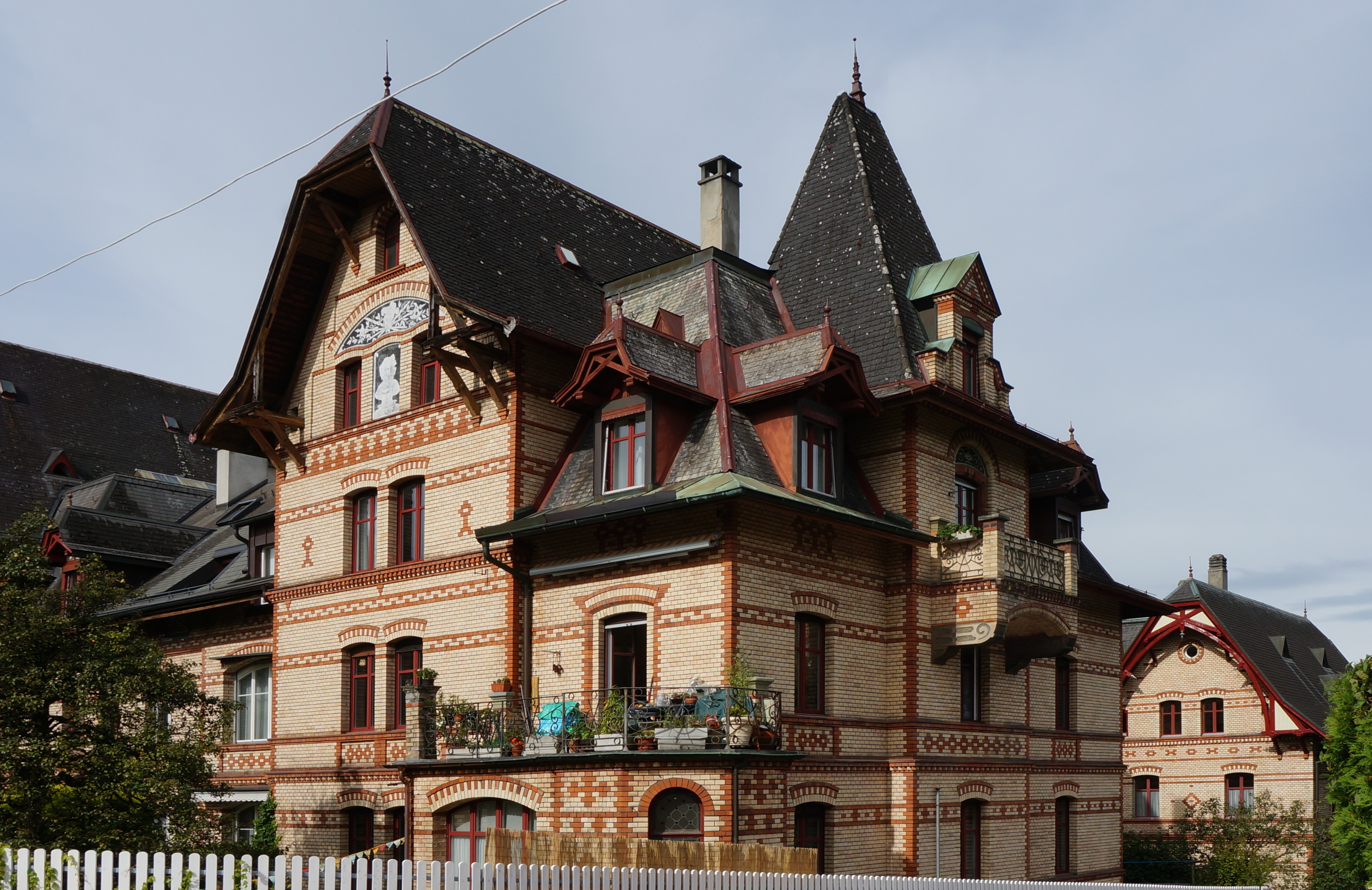 Bern, Backsteinwohnbauten im Obstbergquartier (Obstbergweg 2-14)